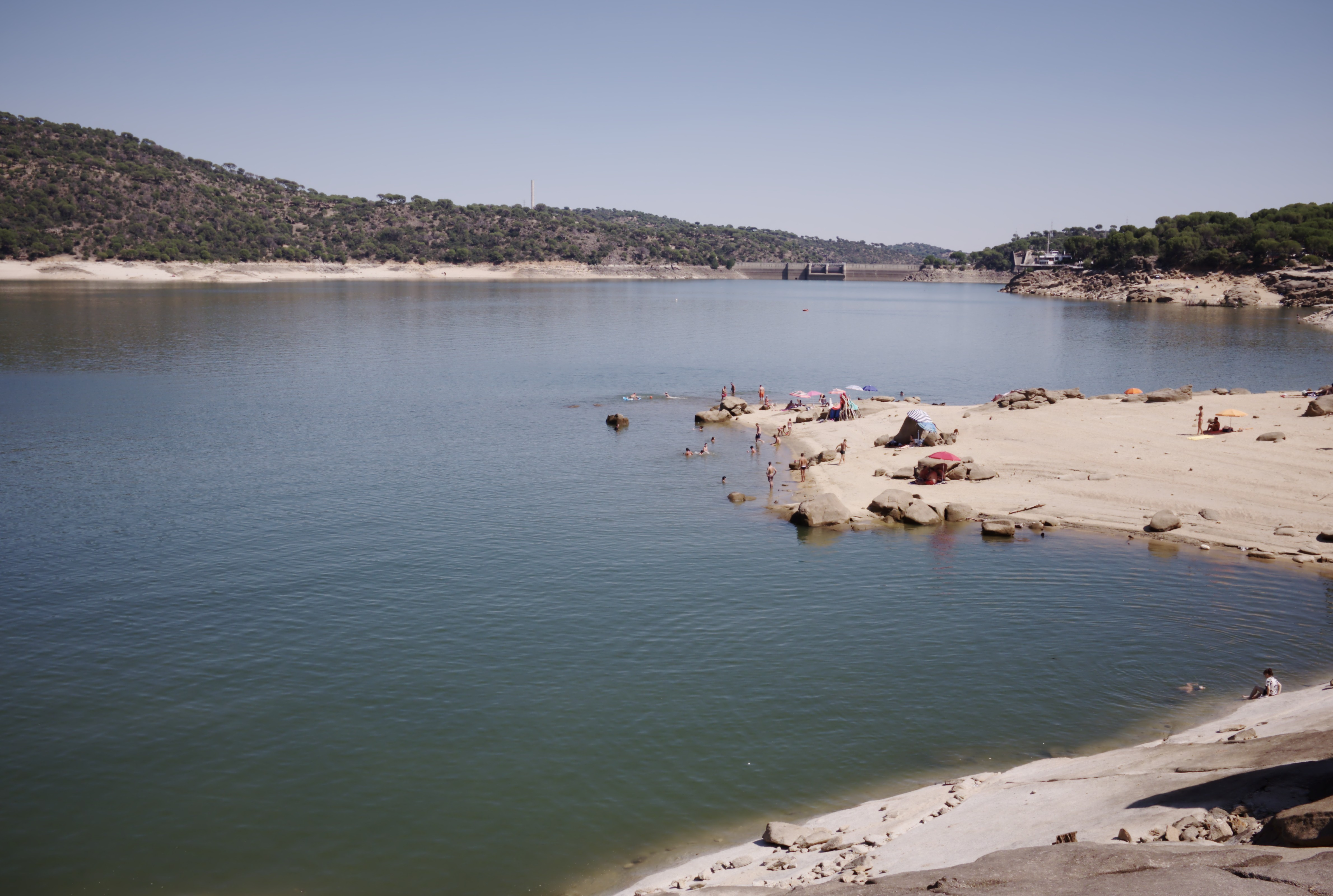 Pantano de San Juan